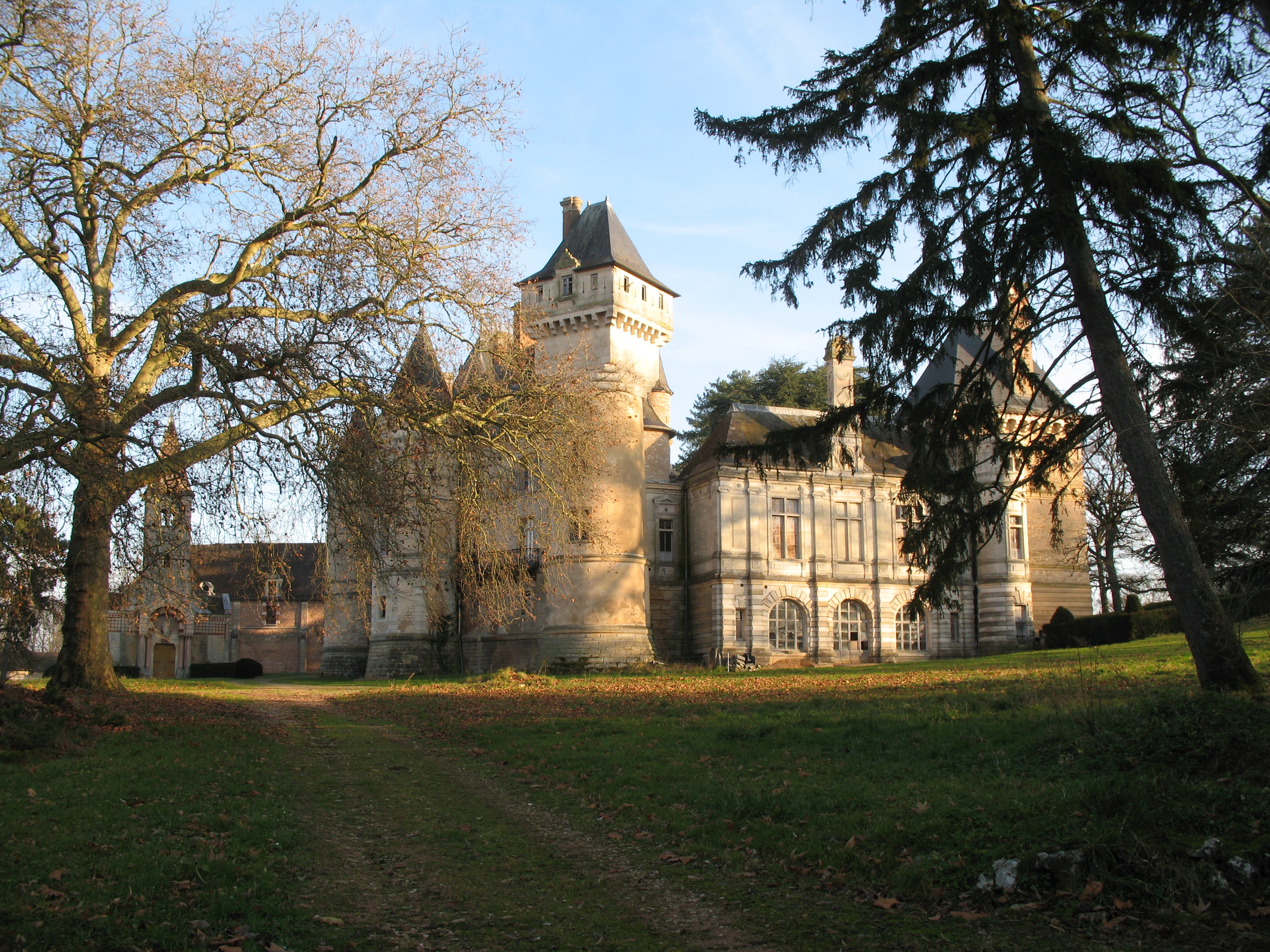 château de Bresse-sur-Grosne (Saône-et-Loire)